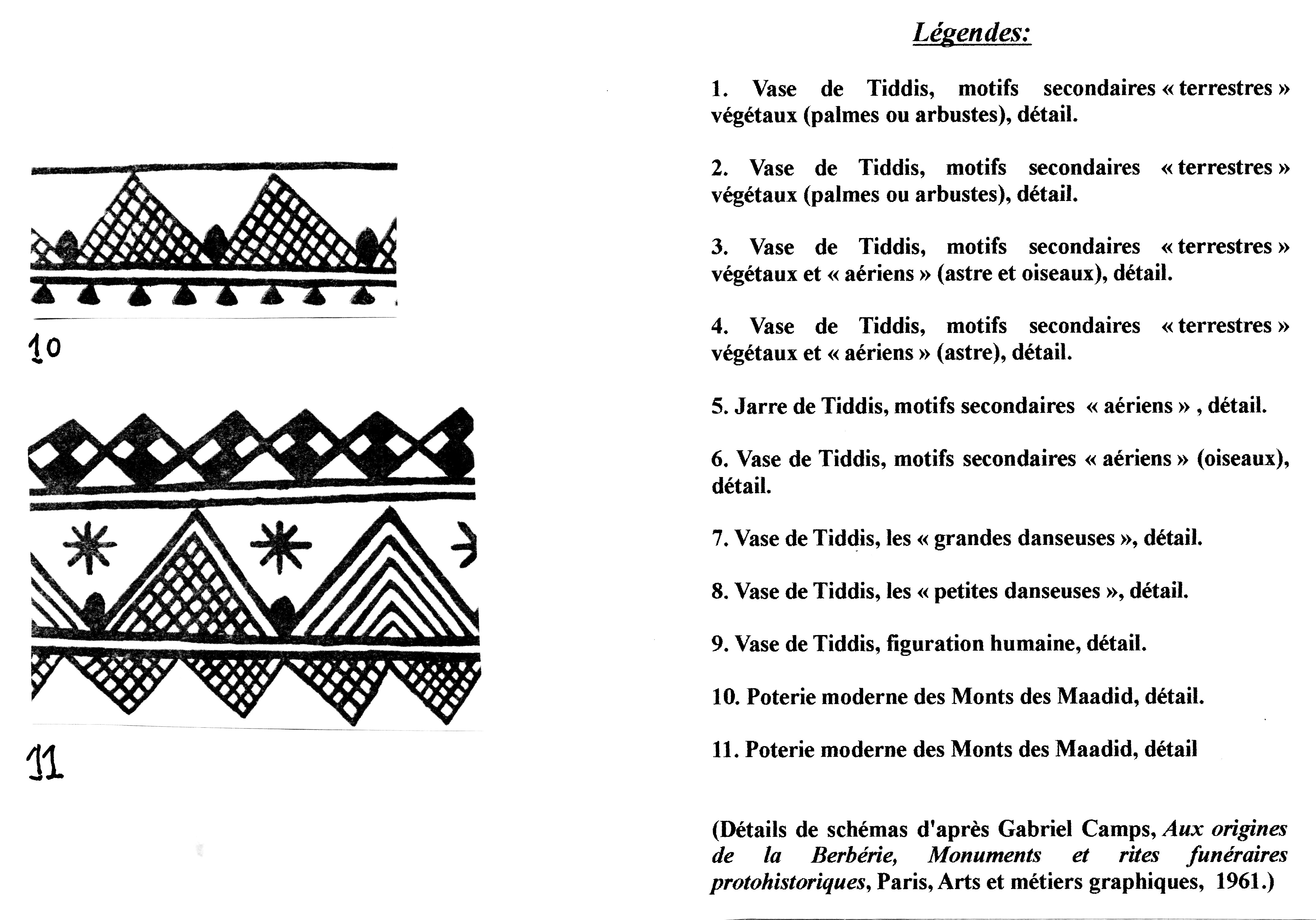 Algérie : comparaison entre décors de vases protohistoriques de Tiddis et de poteries modernes